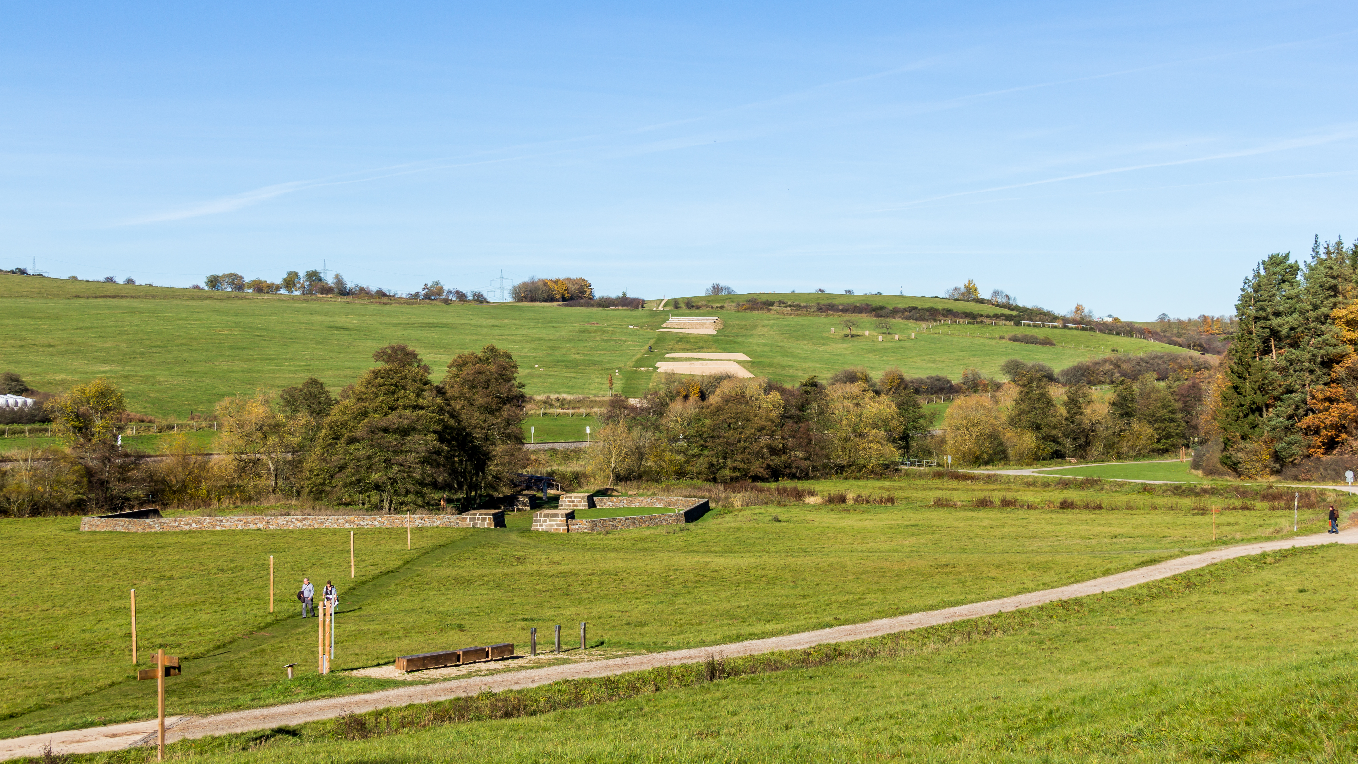 Werkplatz Steinrütsch bei Nettersheim, Kleinkastell. Im Hintergrund am Hang die Grundmauern der römischen Streifenhäuser Das Kleinkastell im Vordergrund gehört zum Naturschutzgebiet „Urfttal mit Seitentälern südlich Nettersheim“ (EU-021), der Hang mit dem Streifenhäusern zum „Landschaftsschutzgebiet Hochfläche der Sötenicher Kalkmulde westlich und südlich Nettersheim“ (LSG-5405-0004)